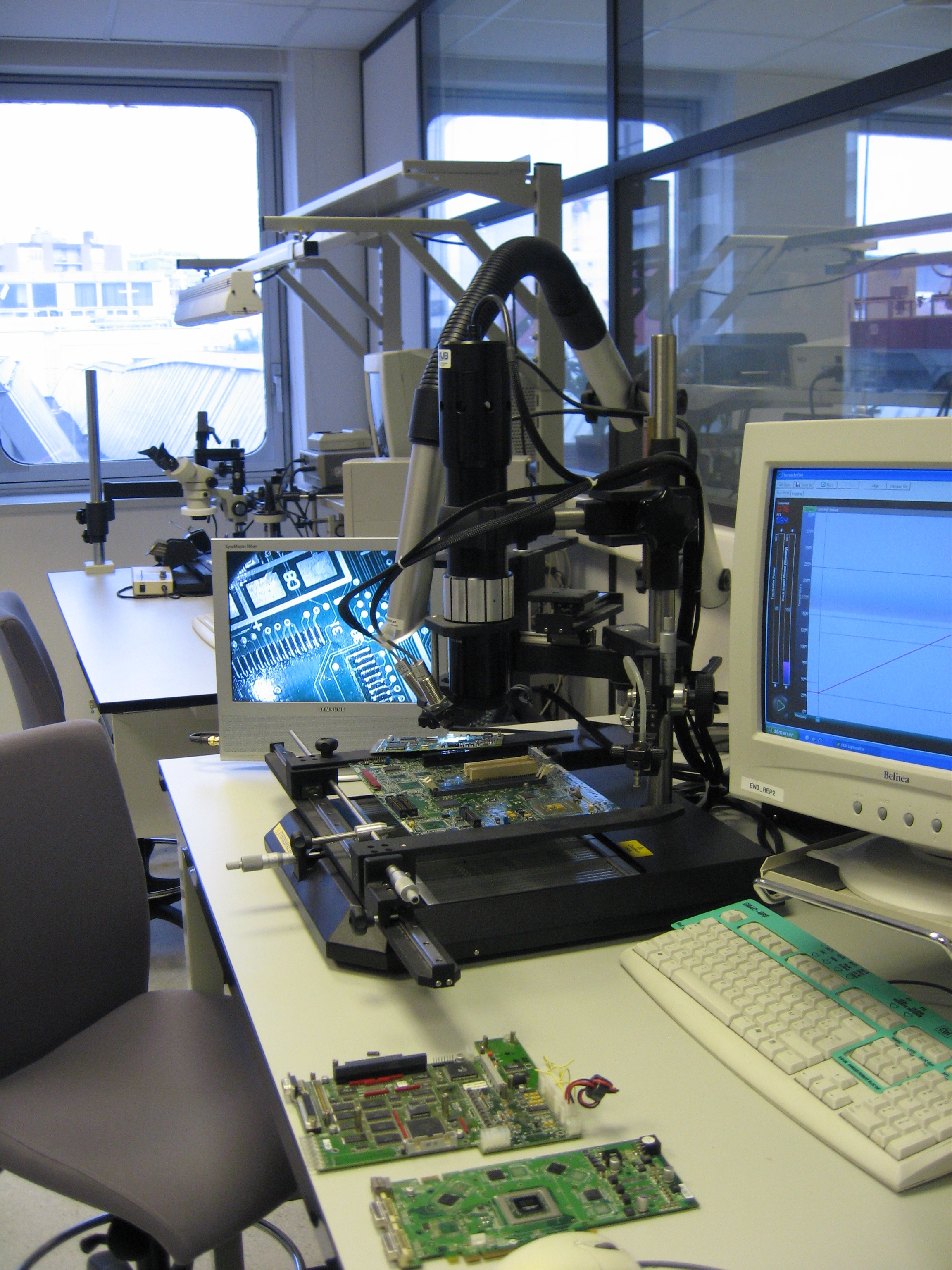 Remplaceur de composants à l'Atelier de Maintenance des Équipements / JPO Ateliers de Saint-Ouen 06/06/2009.